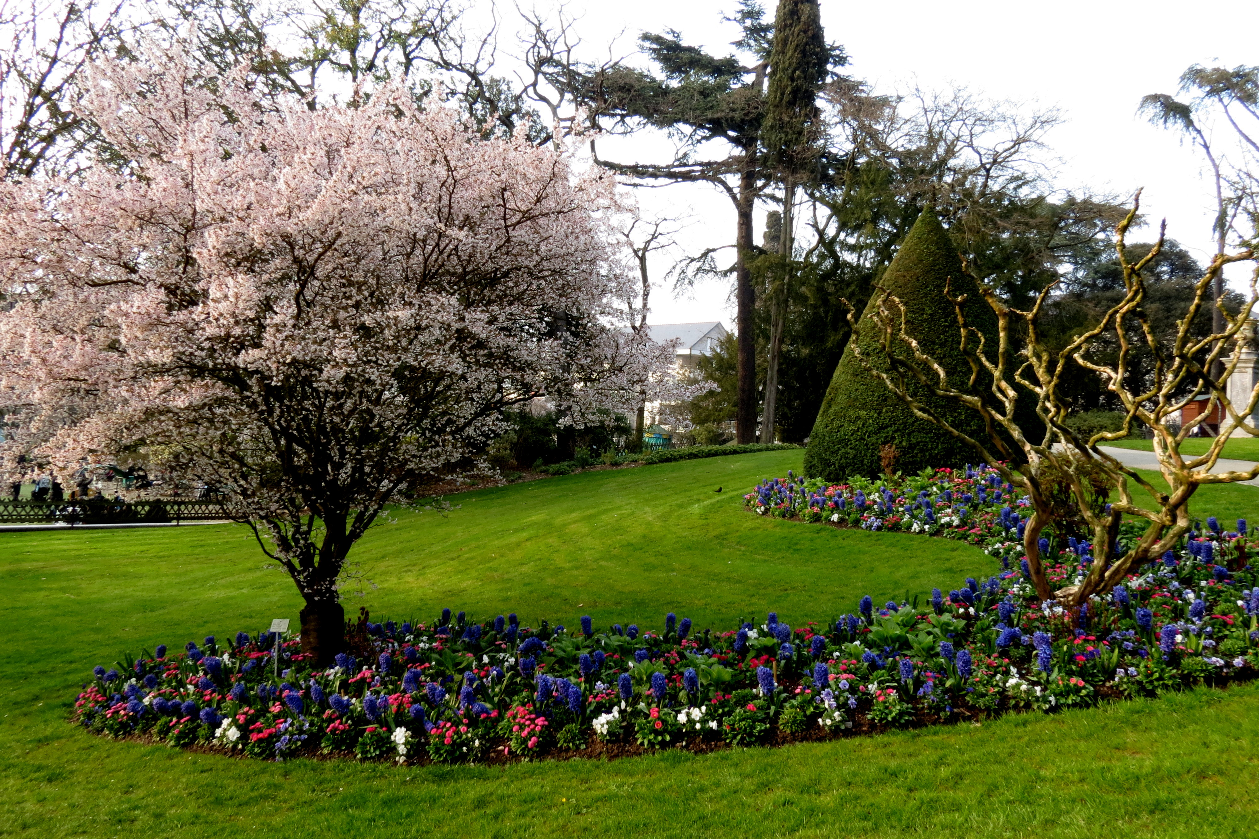 Les châteaux de la Loire.